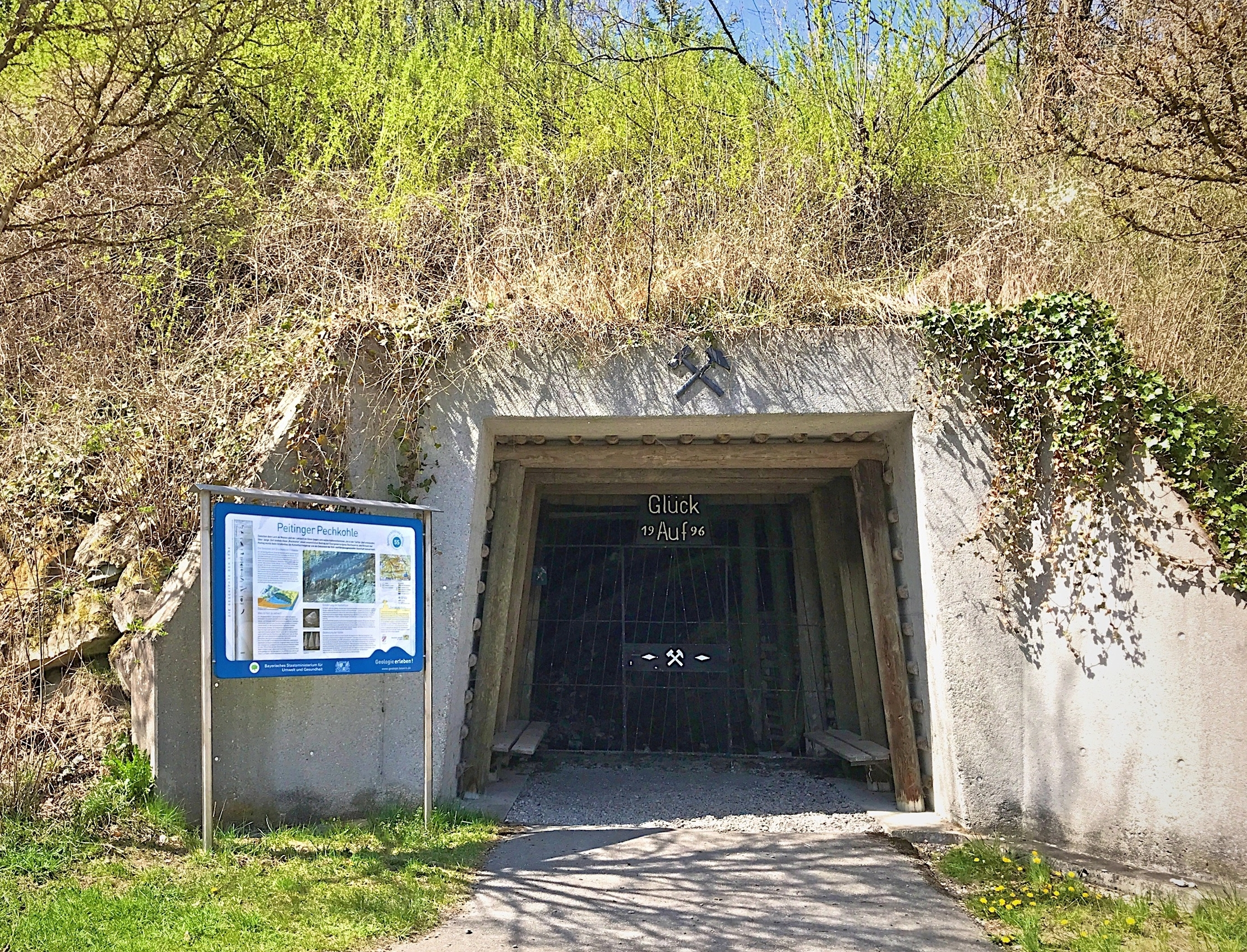 Kohleflöz am Bühlach (Geotop Peitinger Pechkohle)